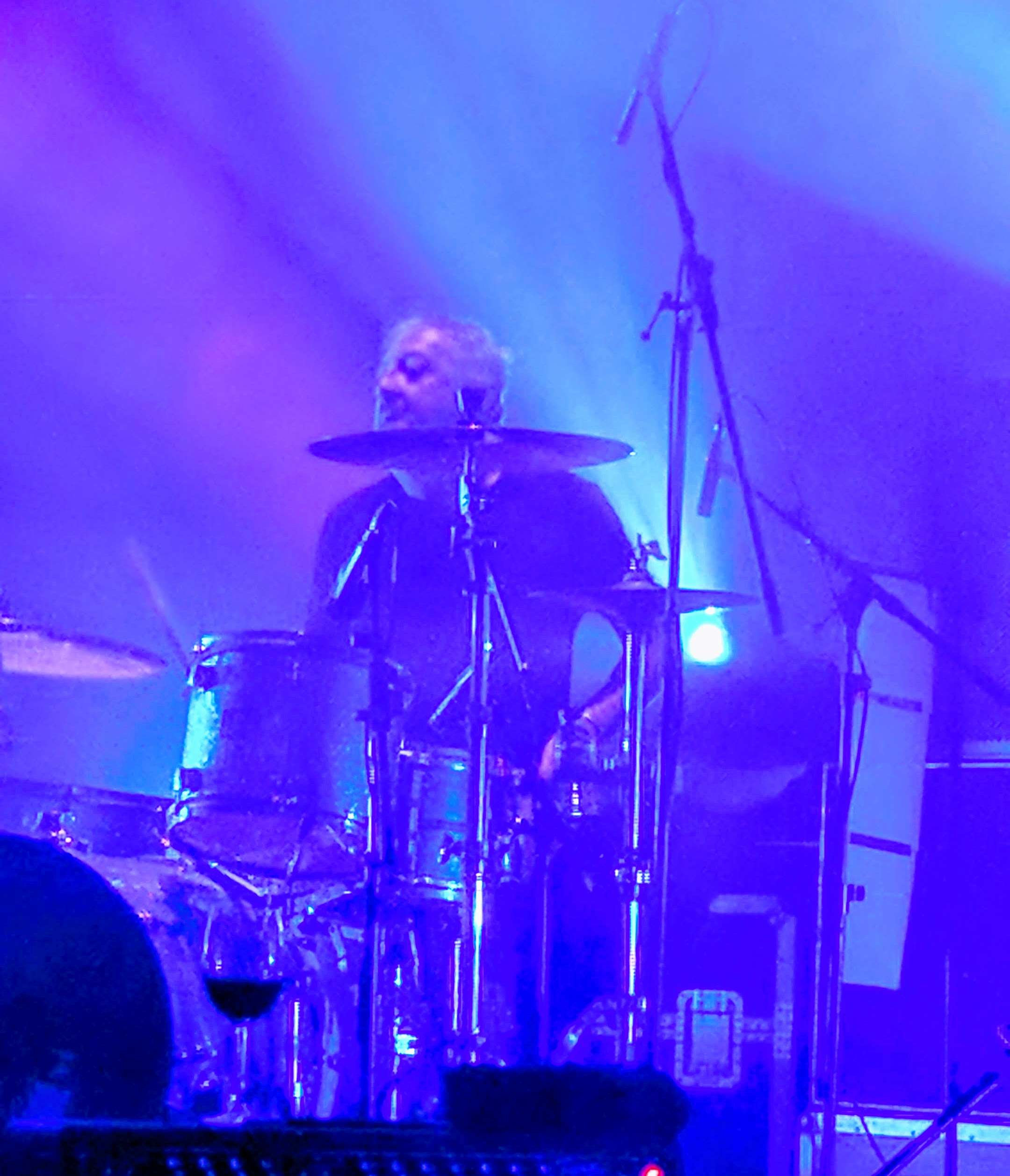 Eric actuando con Los Planetas en A Coruña (22/12/2017)